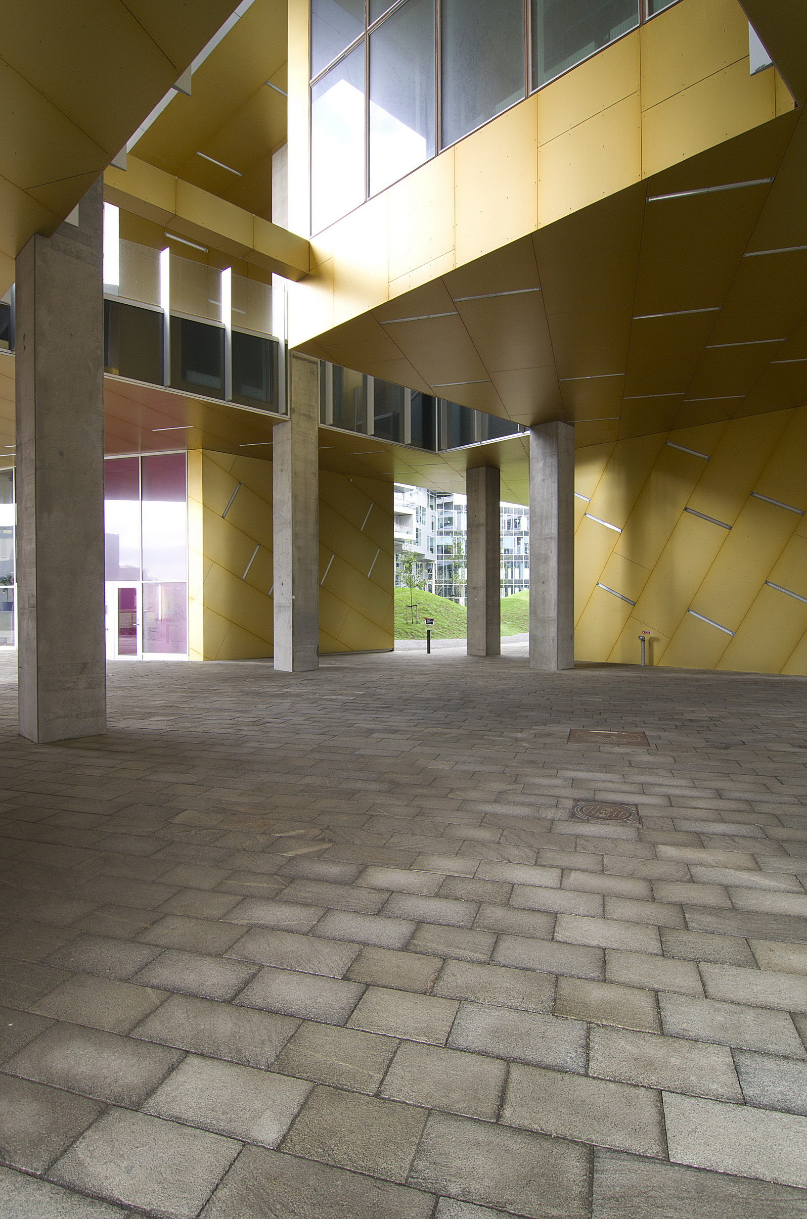 8 House in Copenhagen, Denmark